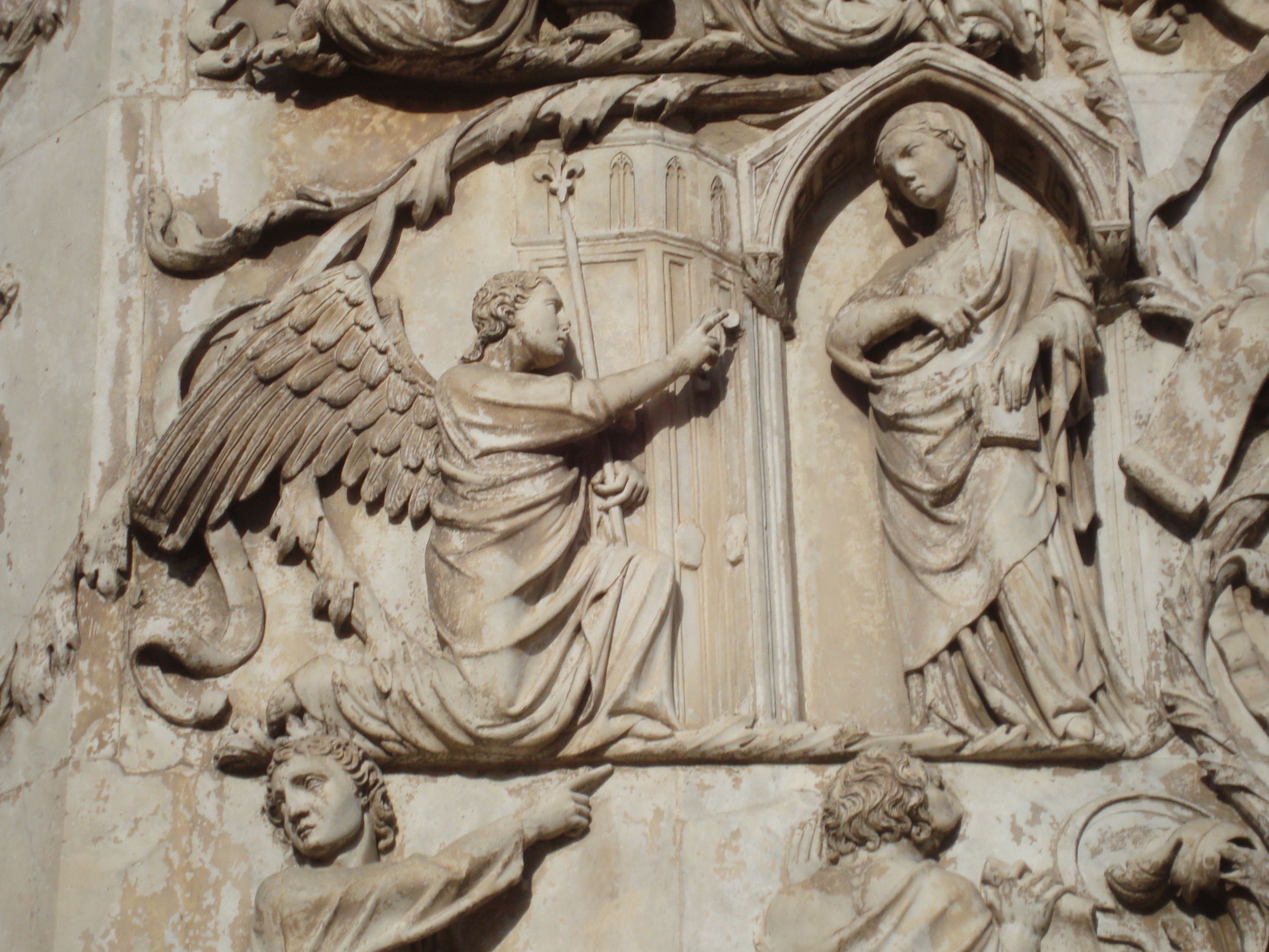 Bas-relief de la façade de la cathédrale d'Orvieto représentant l'Annonciation réalisé par Lorenzo Maitani